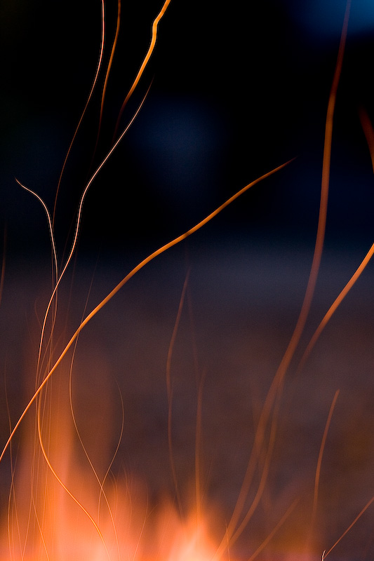 Funkenflug bei langer Belichtungszeit (Bahnlinie).